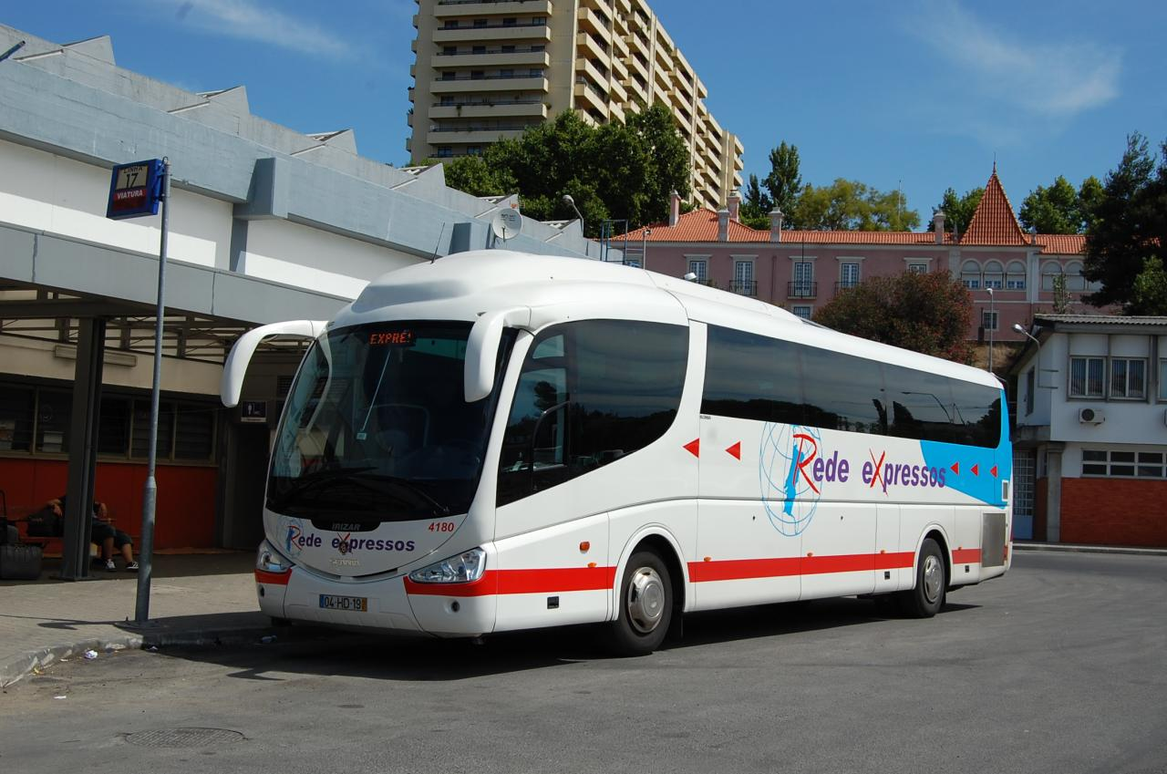 Rede Expressos Bus in Lisbon.